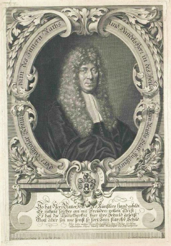 Porträt des Herrn Balthasar Schnurbein zu Meitingen, des Inneren Rates der Reichsstadt Augsburg